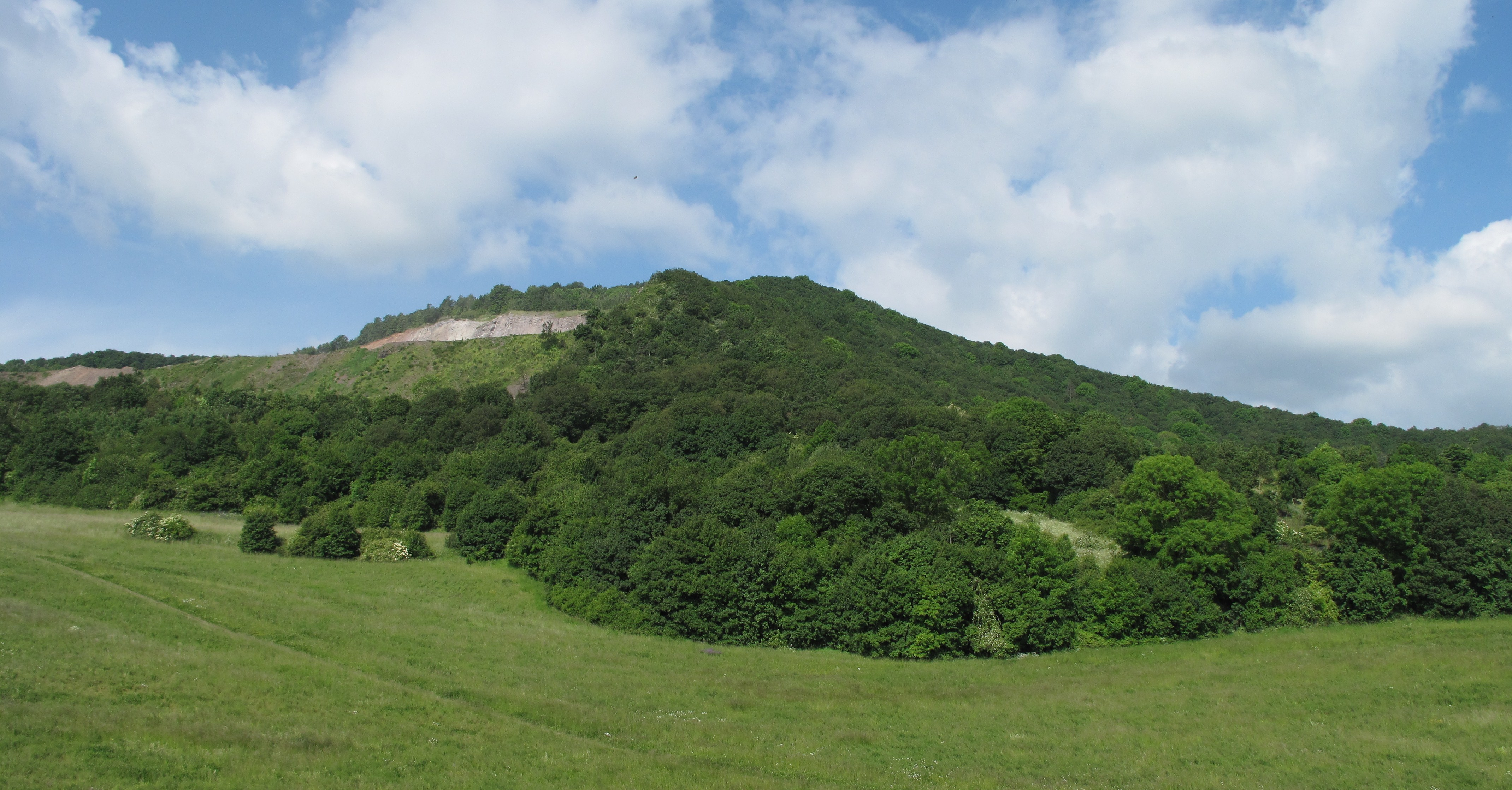 Kubačka z dálnice D8. Česká republika.